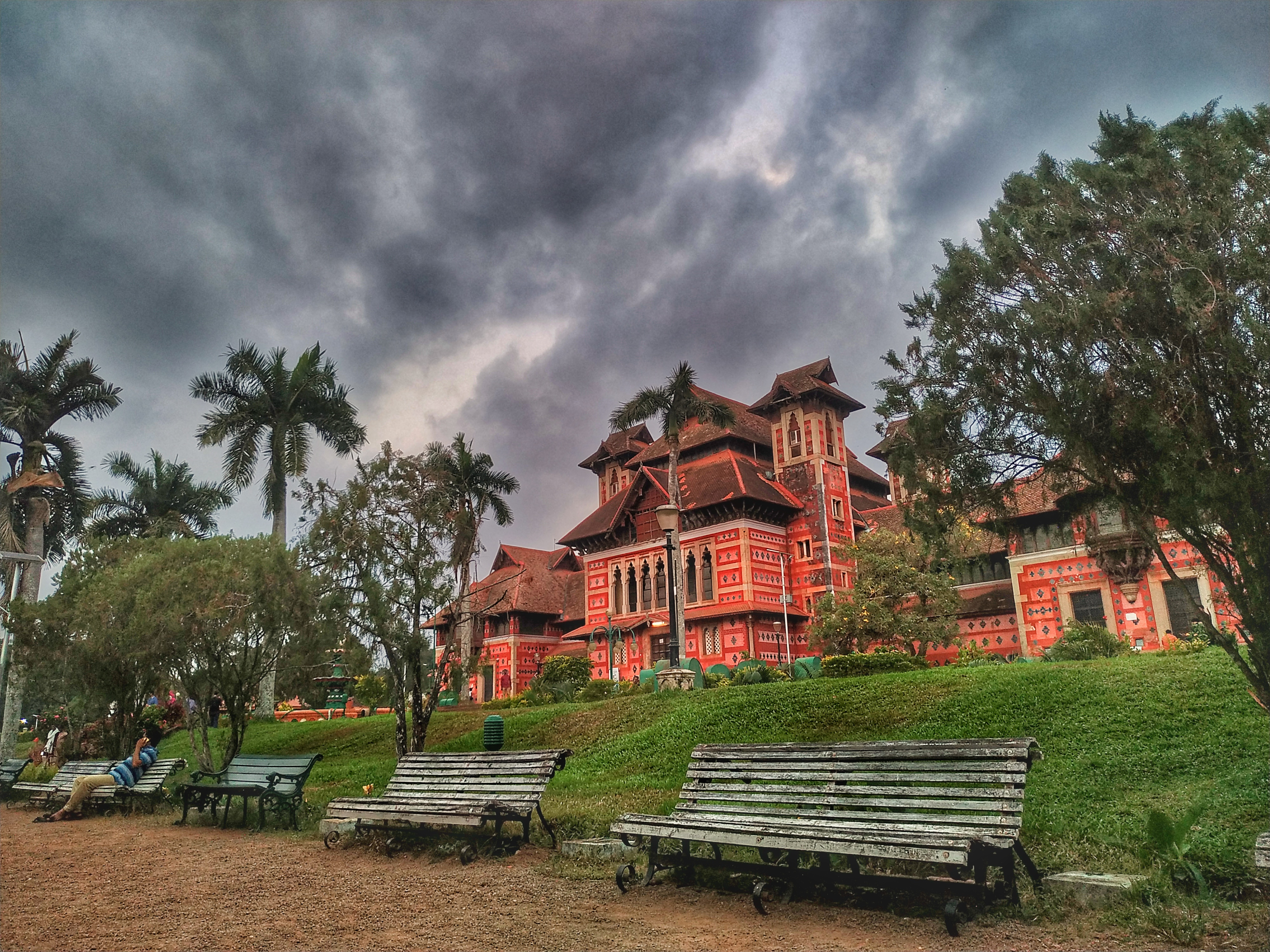 Napier museum and park walkway